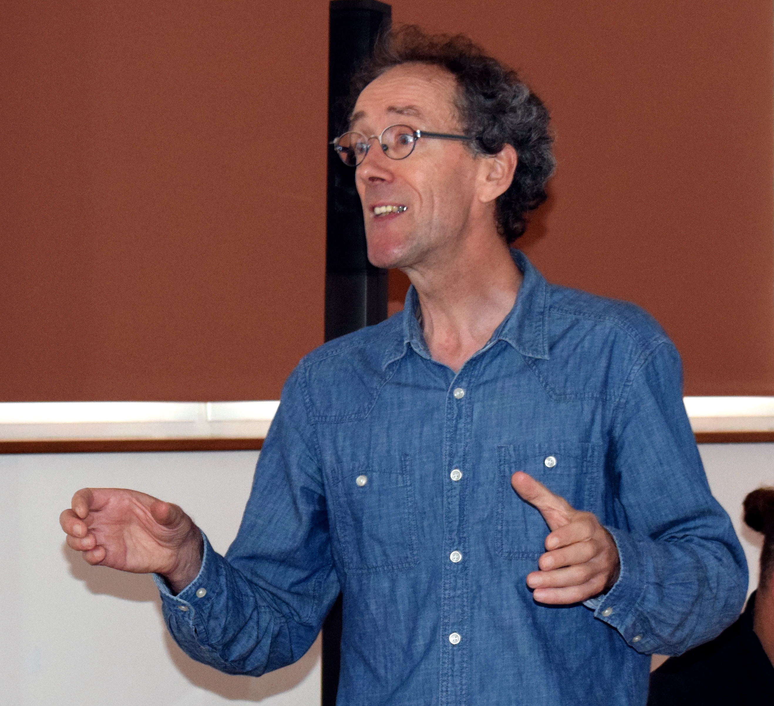 Conférence animée par Fañch An Hénaff à Ti ar Vro Kemper sur "Graphisme et identité" dans le cadre de l'université d'été du festival de Cornouaille 2017.